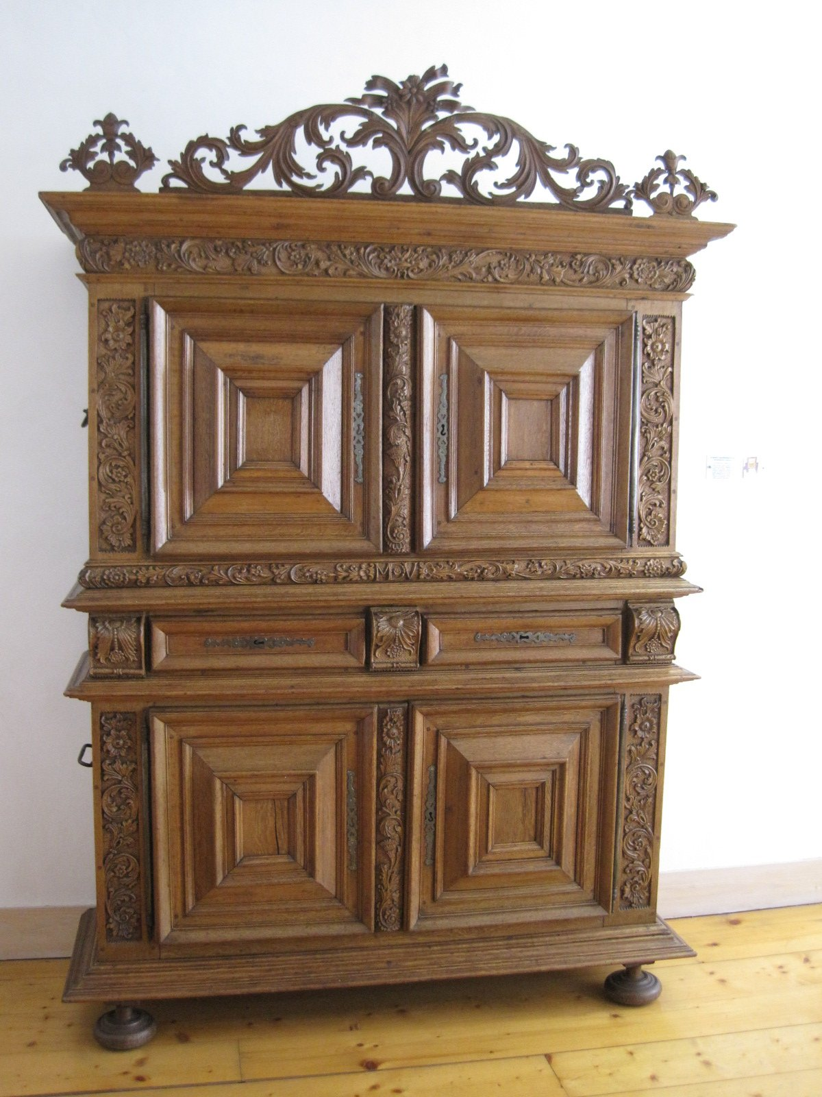 Hôtel Beurnier-Rossel - Armoire montbéliardaise